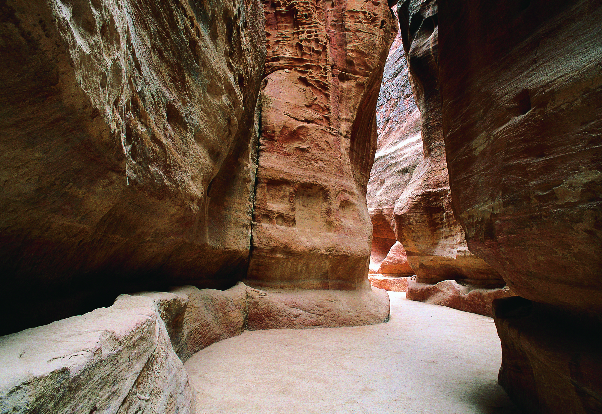 Soutěska Al-Siq v Petře, Jordánsko